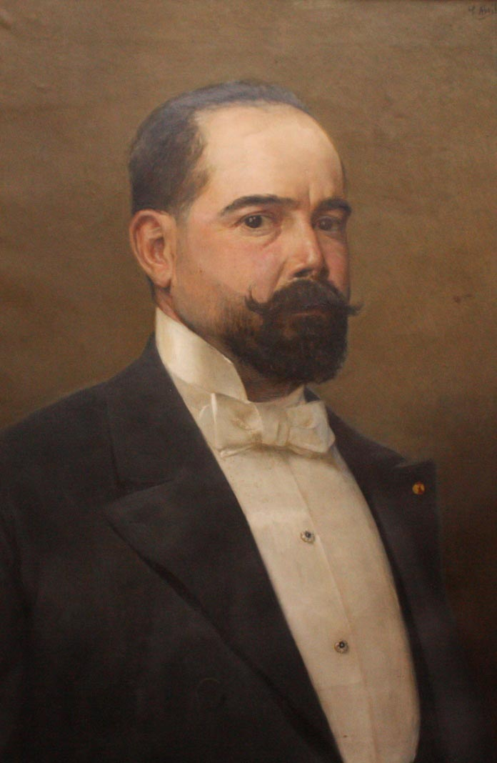 Salvador Abril y Blasco, autorretrato, 1901, colección particular.